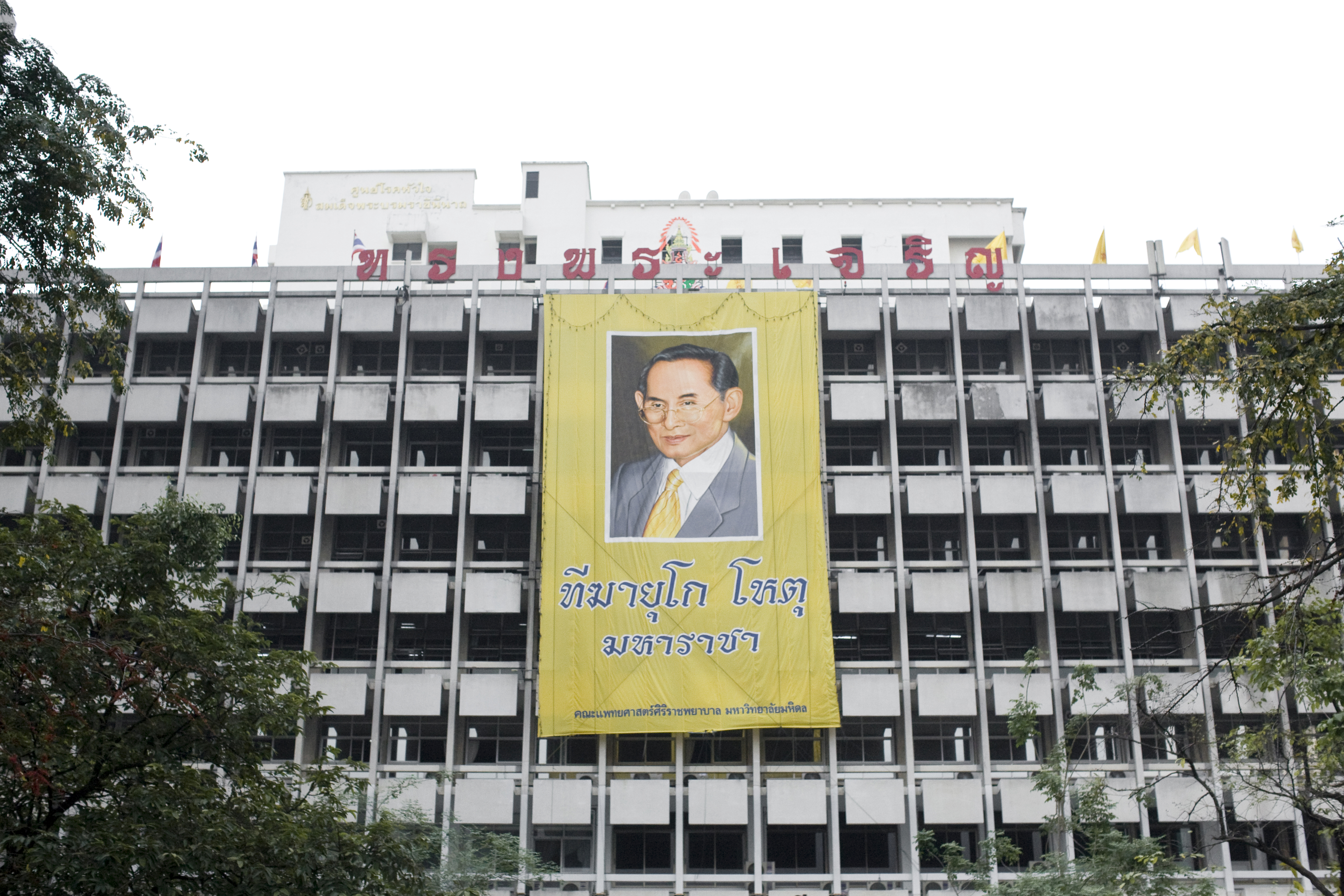 ทรงพระเจริญ นายกรัฐมนตรี และคณะรัฐมนตรี ลงนามถวายพระพร พระบาทสมเด็จพระเจ้าอยู่หัวฯ​ ณ โรงพยาบาลศิริราช กรุงเทพฯ​ 15ธันวาคม2552 (The Official Site of The Prime Minister of Thailand Photo by พีรพัฒน์ วิมลรังครัตน์)